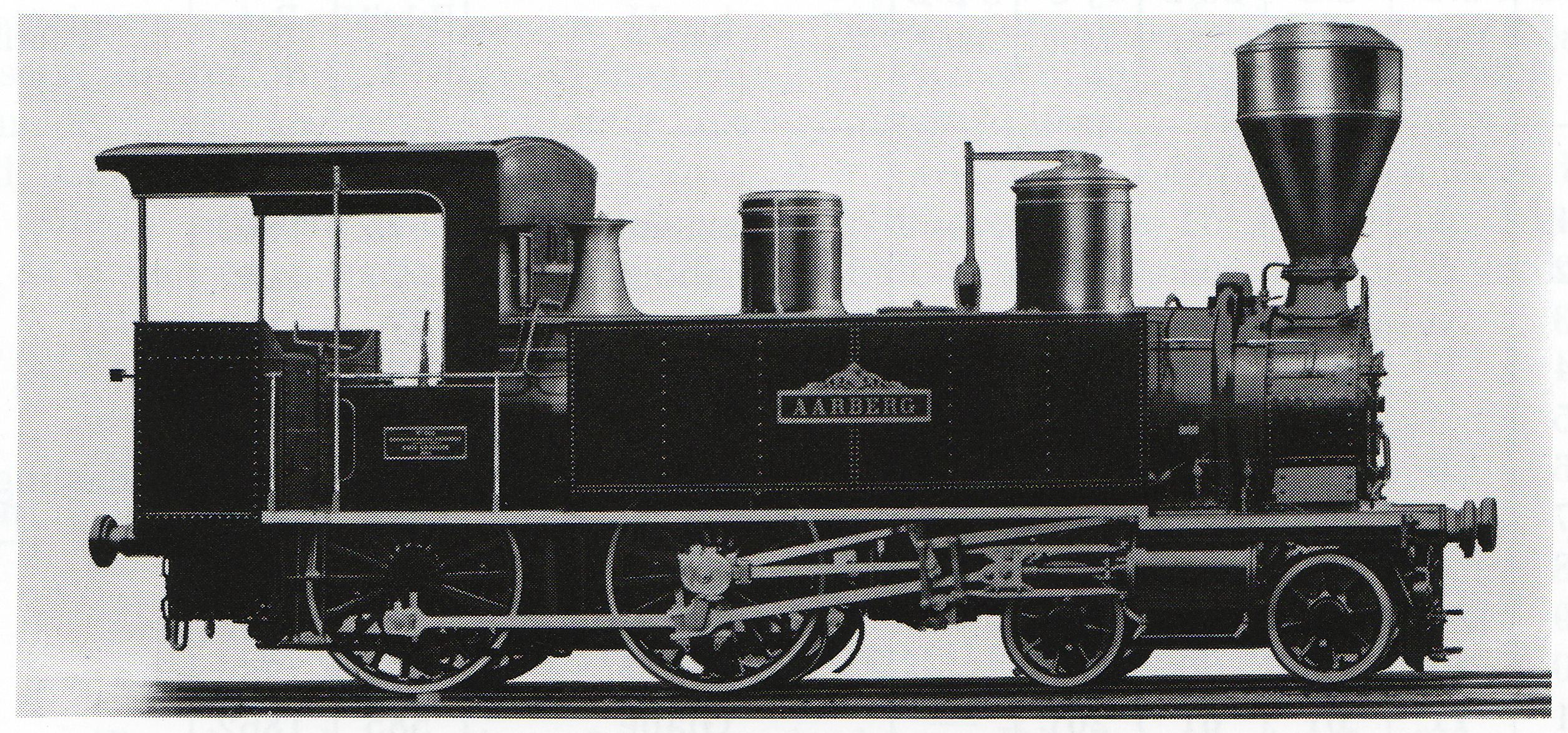 Peſonenzuglocomotive A2 Nr. 12 Aarberg/Bueren, gebaut 1864 inn Emil Keſslers Machines-Fabrique zů Eſslingen (Fabr.-Nr. 654) für die Berniſche Staatsbahn, 1877 von den Chemins de fer du Jura Bernois übernommen, 1884 an die Jura–Bern–Luzern-Bahn, 1890 an die Jura—Simplon-Bahn, 1896 außer Dienſt geſtellt und anſchließend abgebrochen.